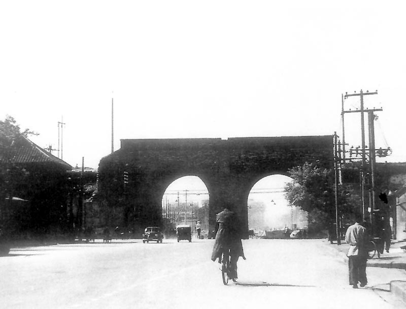 北京和平门。